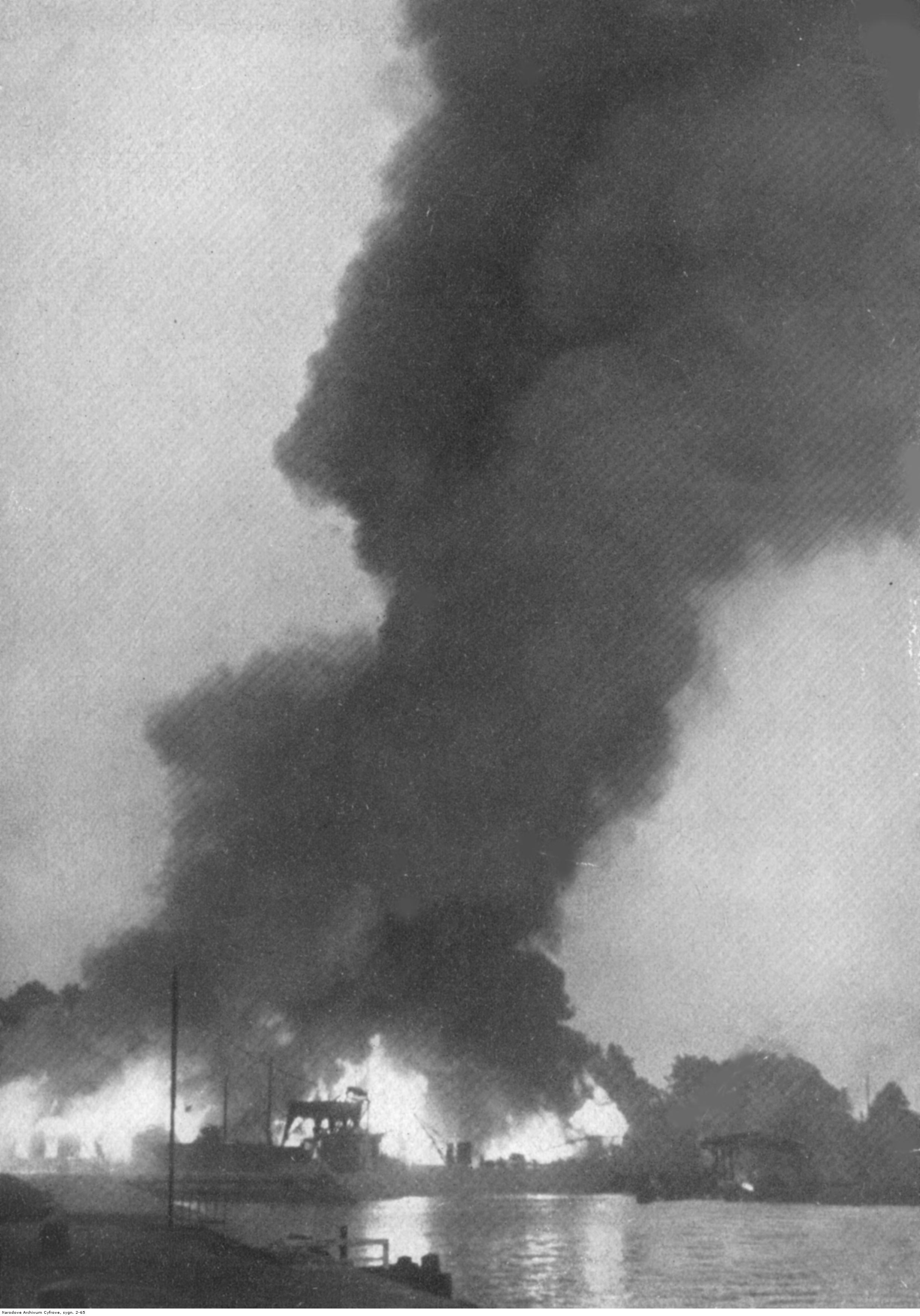 Płonące Warsztaty Portowe Rady Portu i Dróg Wodnych położone przy ogrodzeniu Wojskowej Składnicy Tranzytowej na Wersterplatte. Fotografia wykonana z Nowego Portu w Gdańsku.